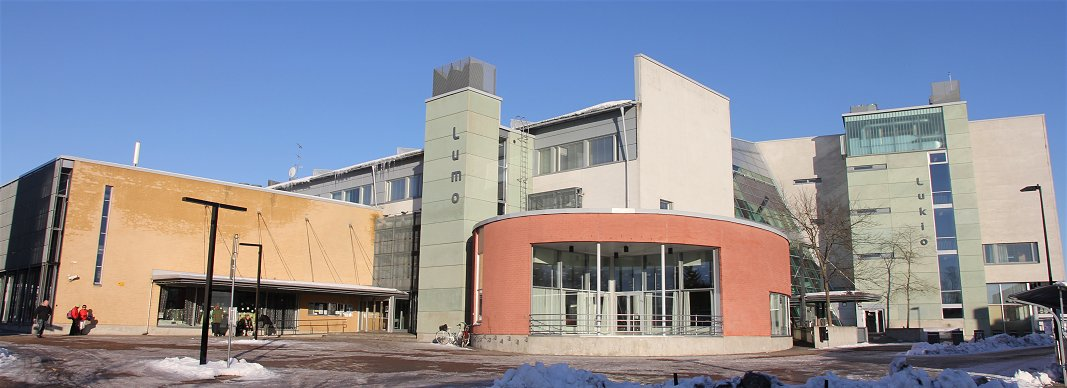 Lumon monitoimitaloa Vantaan Korsossa. Rakennuksen pääkäyttäjä on Lumon lukio. Kuvan vasemmassa laidassa, rakennuksen keltatiilisessä osassa toimii Vantaan kaupunginkirjaston Lumon kirjasto.